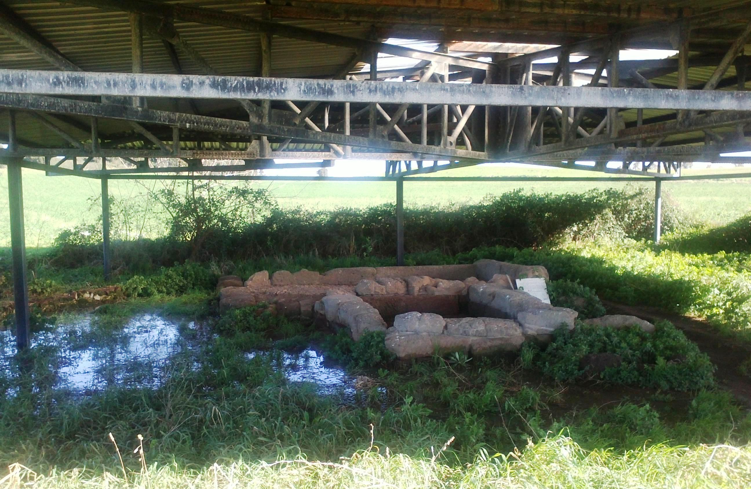 Lavinium - Heroon di Enea